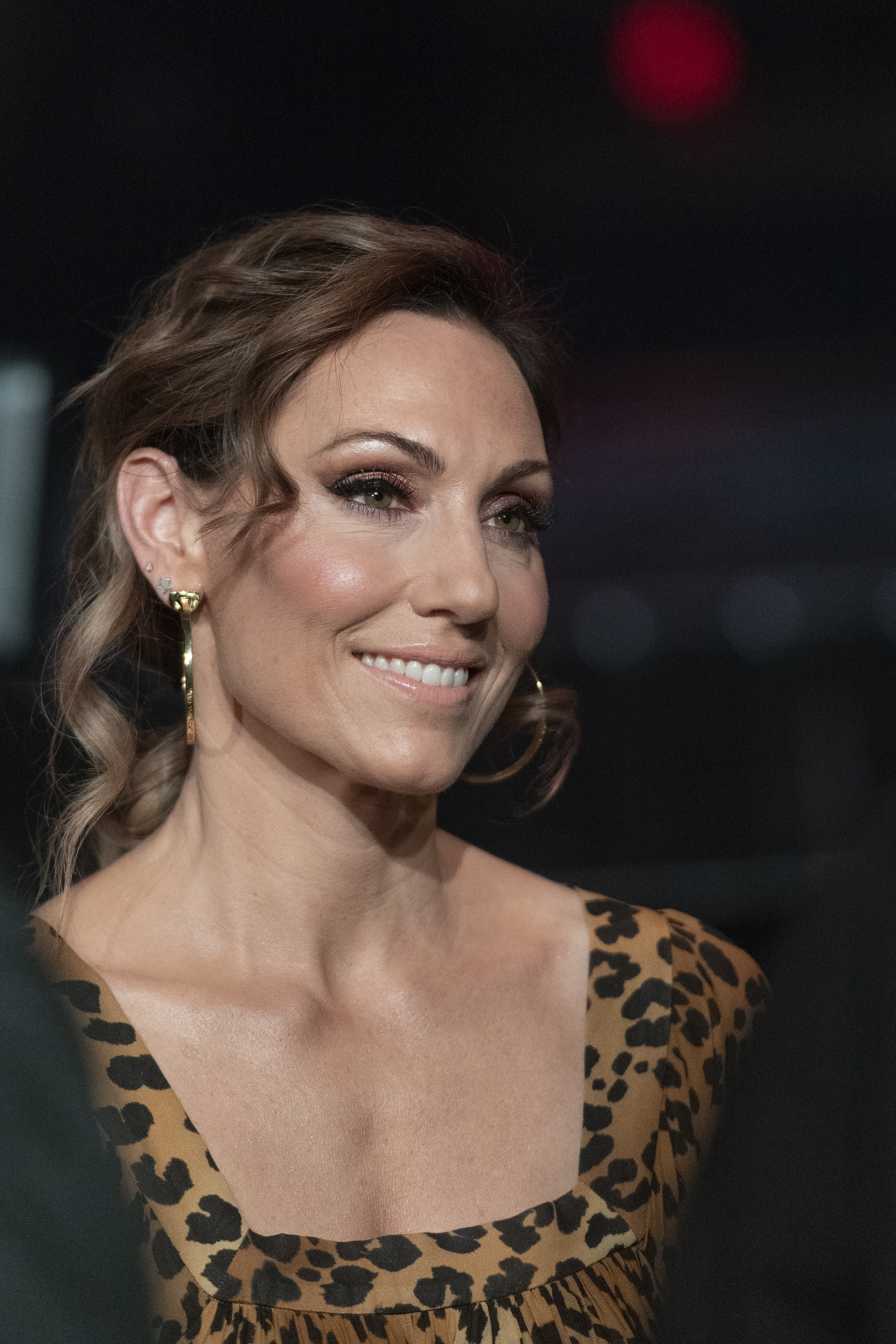 Lina Hedlund programledare Melodifestivalen 2020 Linköping